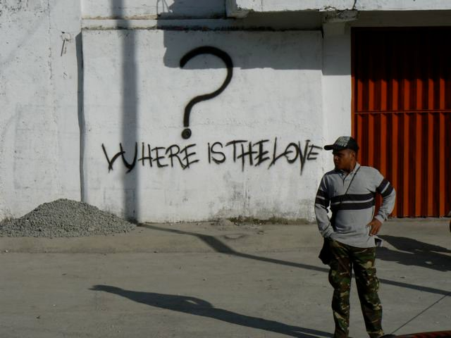 Graffiti in Osttimor